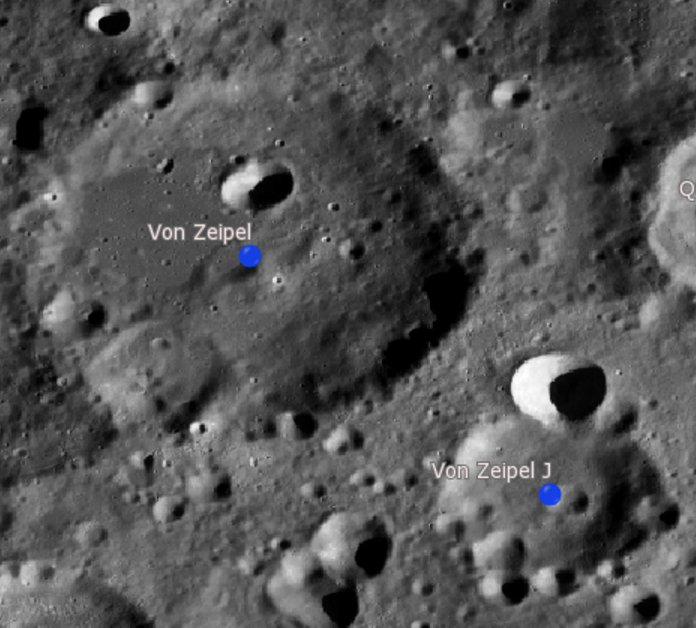 Cráter lunar von Zeipel. Cráteres satélite. (Imagen LRO)